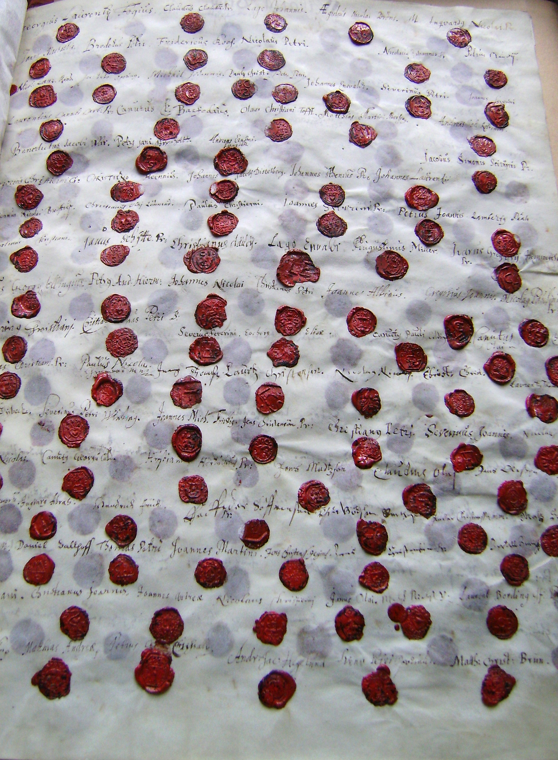 Enevoldsarveregeringsakten, Danmark-Norges nye forfatning fra 1661